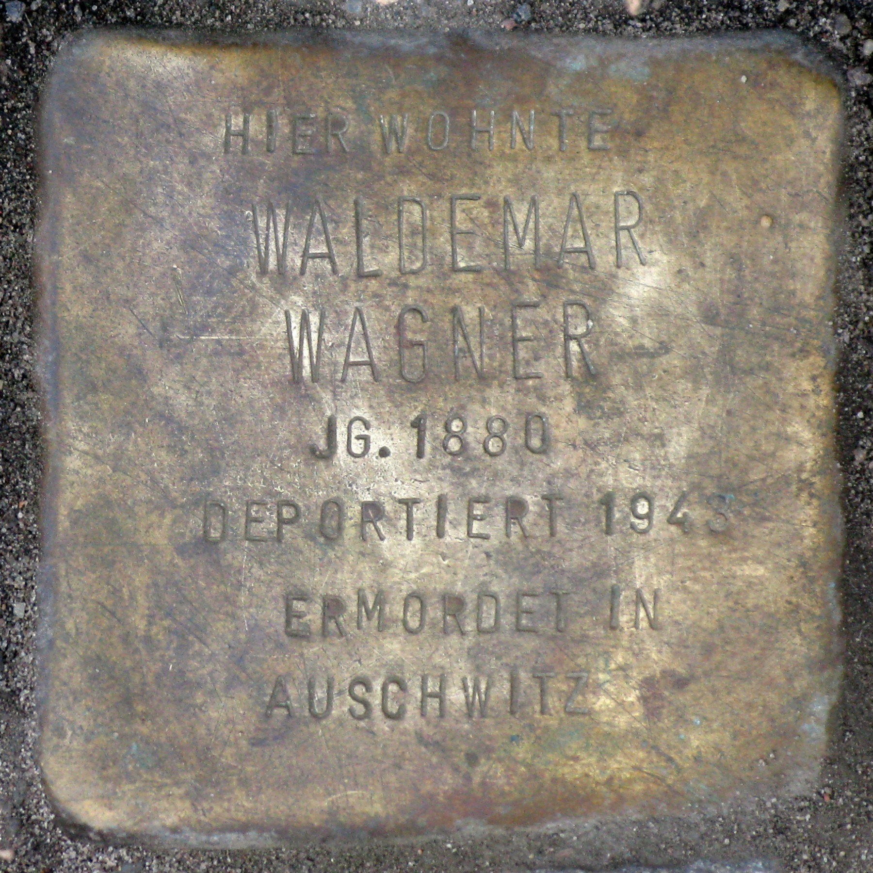 Stolperstein für Waldemar Wagner, Giesebrechtstraße 15, Berlin-Charlottenburg